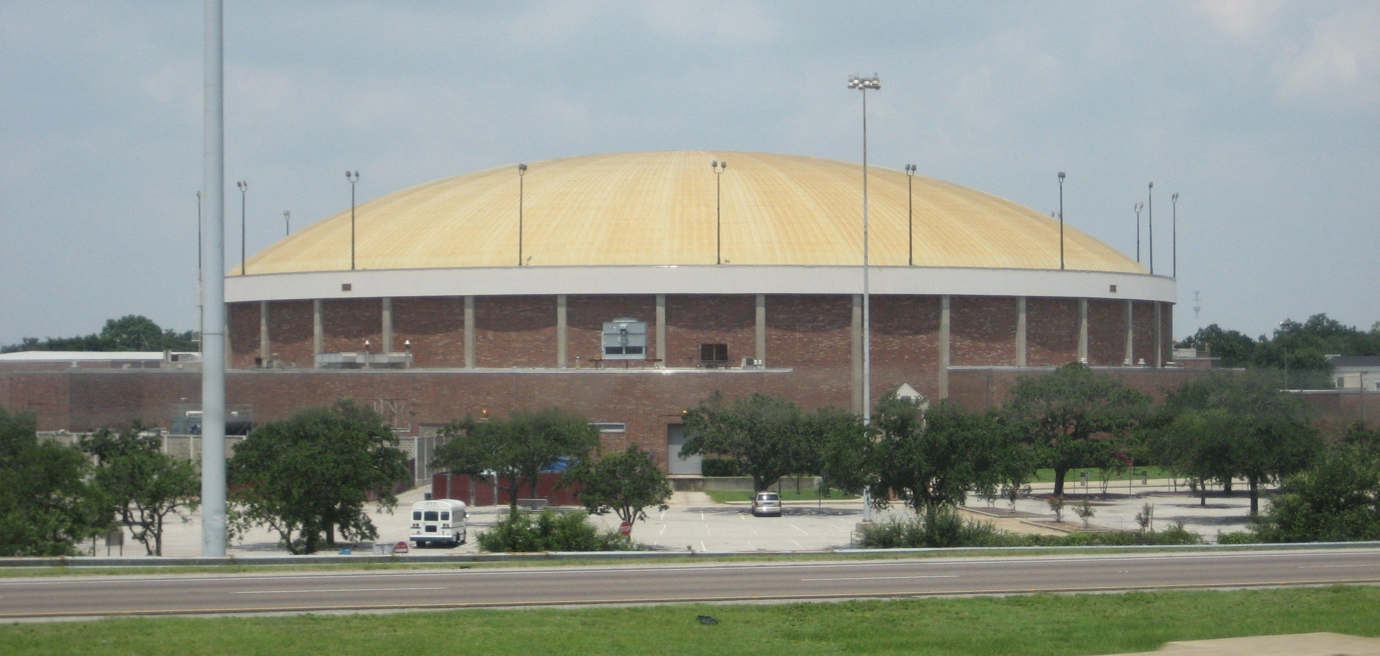 Mobile Civic Center Dome, Mobile, Alabama